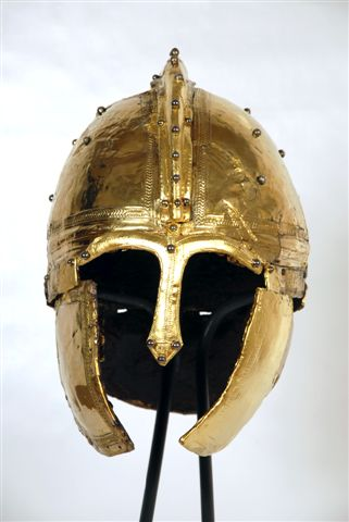 Шлем Бр.2 - Музеј Војводине Museum of Vojvodina Native nameМузеј ВојводинеLocationNovi SadCoordinates45° 15′ 23.57″ N, 19° 51′ 06.32″ E Established14 October 1847Web page control : Q6941048 VIAF: 231993869 LCCN: n2012009683 GND: 4283993-2 WorldCat institution QS:P195,Q6941048